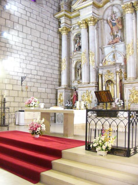 Iglesia de San Miguel Arcángel en Villalbarba